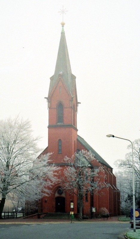 Die Herz-Jesu-Kirche (ehemals:"Katholische Garnisonkirche") ist die älteste römisch-katholische Kirche in Cuxhaven